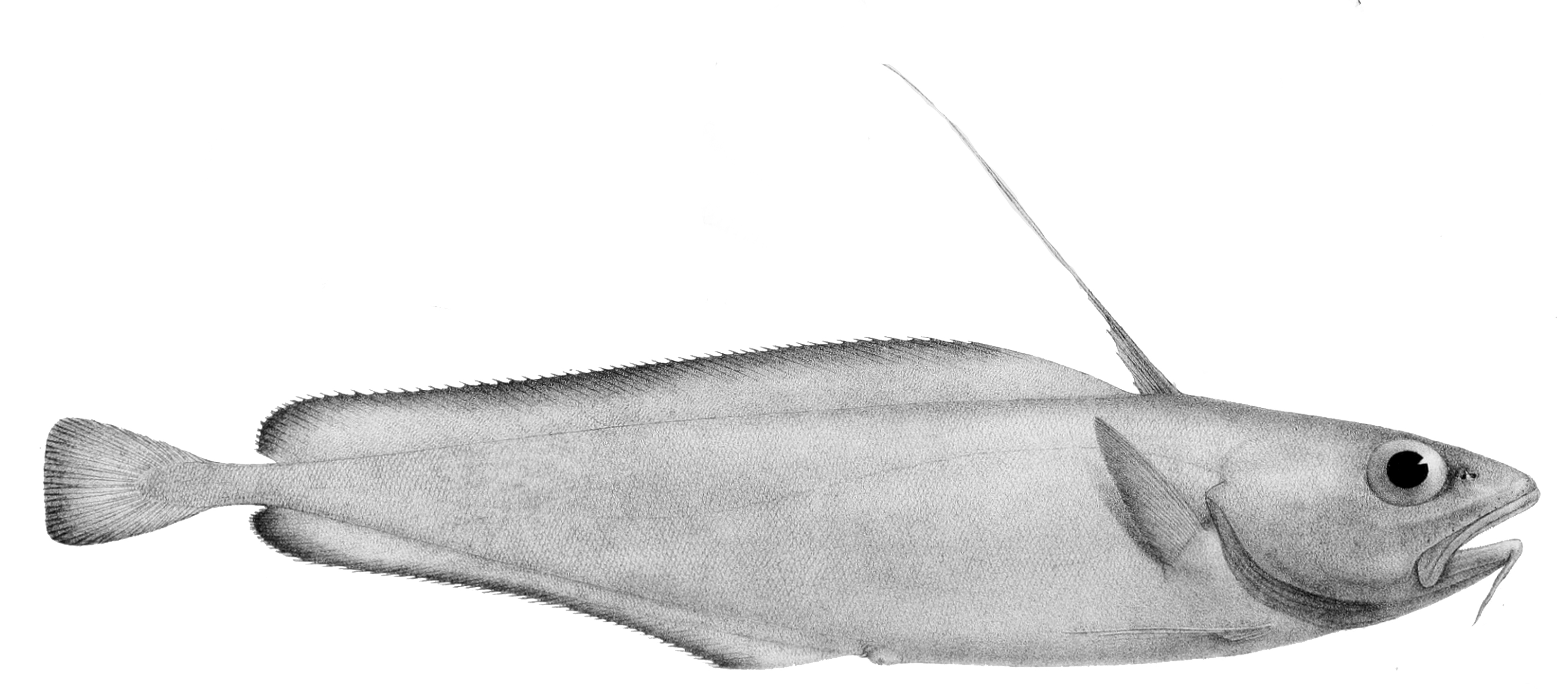 Lepidion inosimae